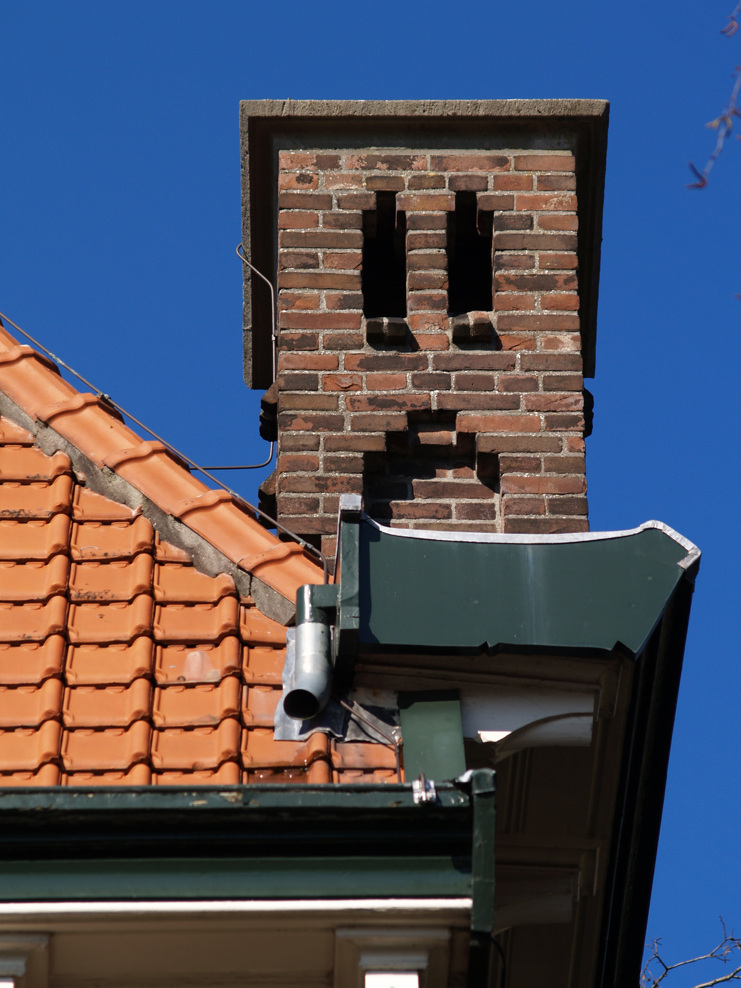 Voormalige dokterswoning annex praktijk, thans notariskantoor te Valkenswaard.